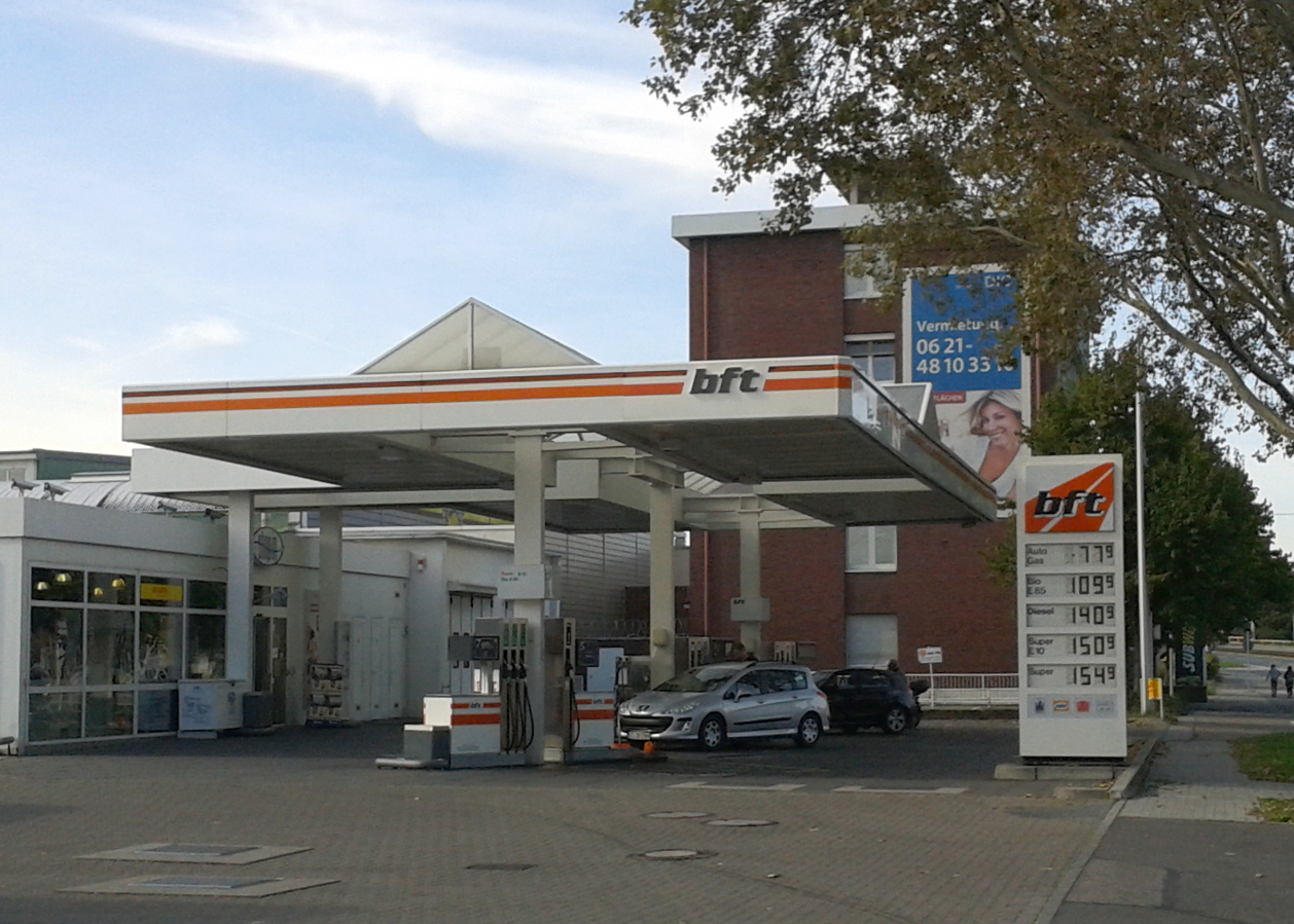 Hammer Factory Store in Mannheim, E3